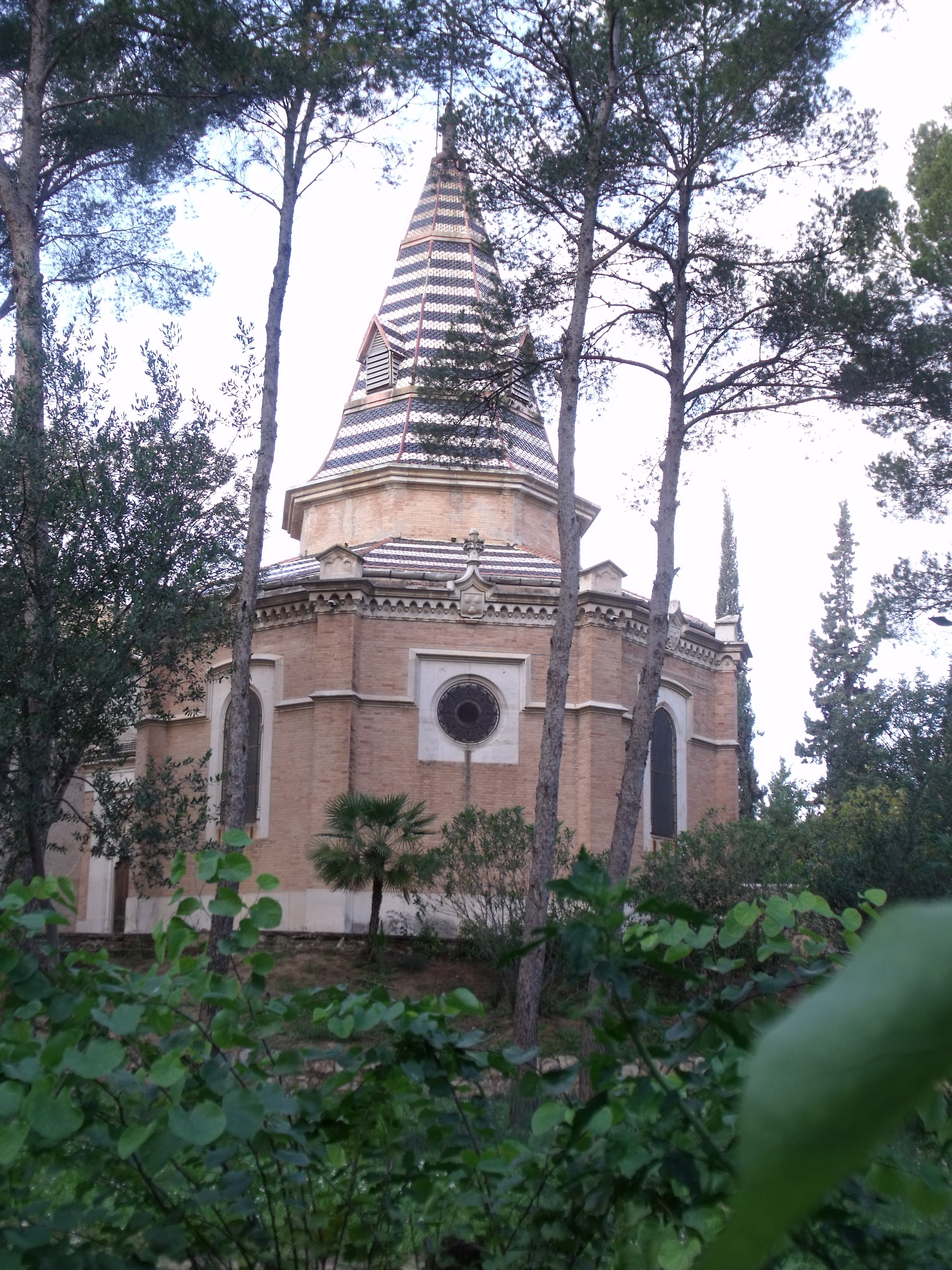 Panteón de Dos Aguas. Bétera, España.